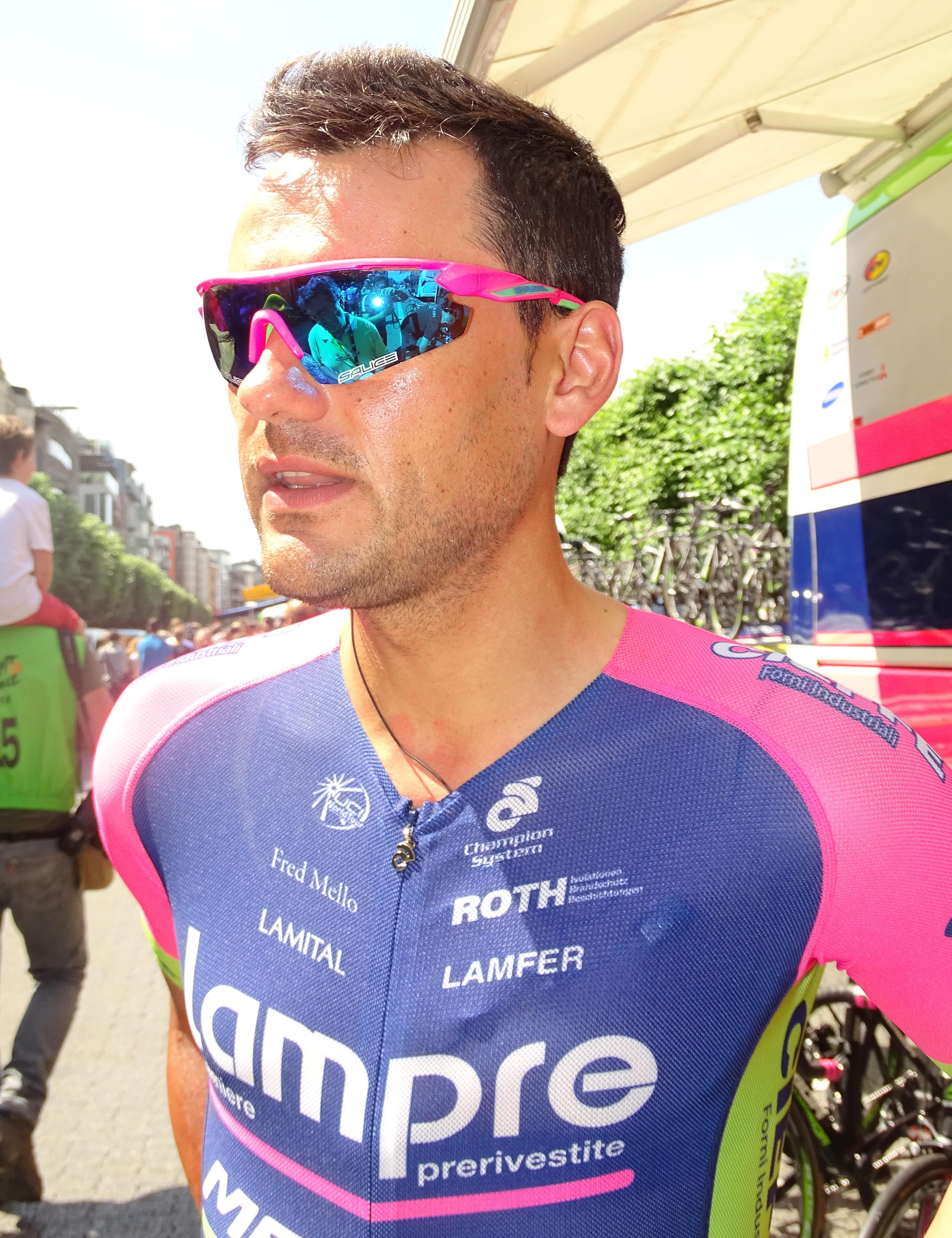 Reportage réalisé le lundi 6 juillet à l'occasion du départ de la troisième étape du Tour de France 2015 à Anvers, Belgique.